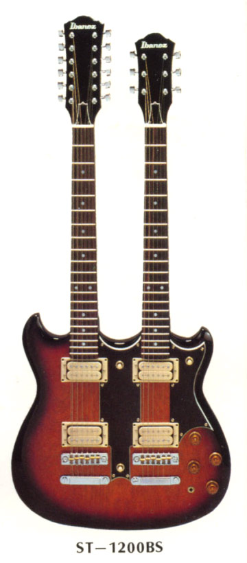 Ibanez_Studio_ST-1200BS_double_neck_electric_guitar